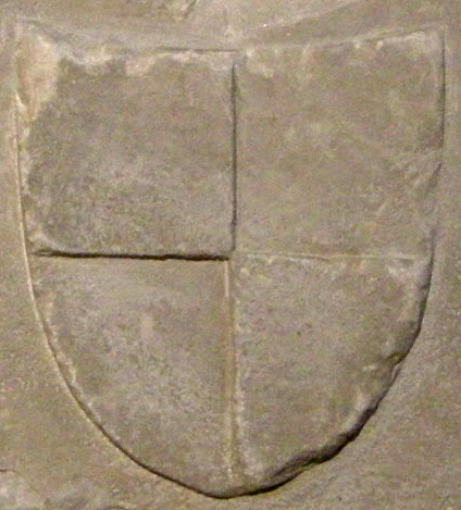 Lapidario, stemma tornaquinci2